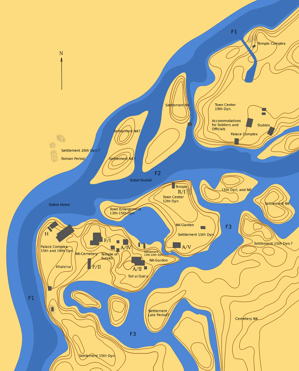 Karte mit der rekonstruierten Landschaft von Auaris / Tell el-Dab'a (ca. 1500 v. Chr.) im östlichen Nildelta im Alten Ägypten; Pelusischer Nilarm; Projekt des Österreichischen Archäologischen Instituts; verschiedene Fundplätze aus dem Mittleren Reich und Neuen Reich; nördlich von Auaris/Tell el-Dab'a liegt Pi-Ramesse/Qantir Siehe auch